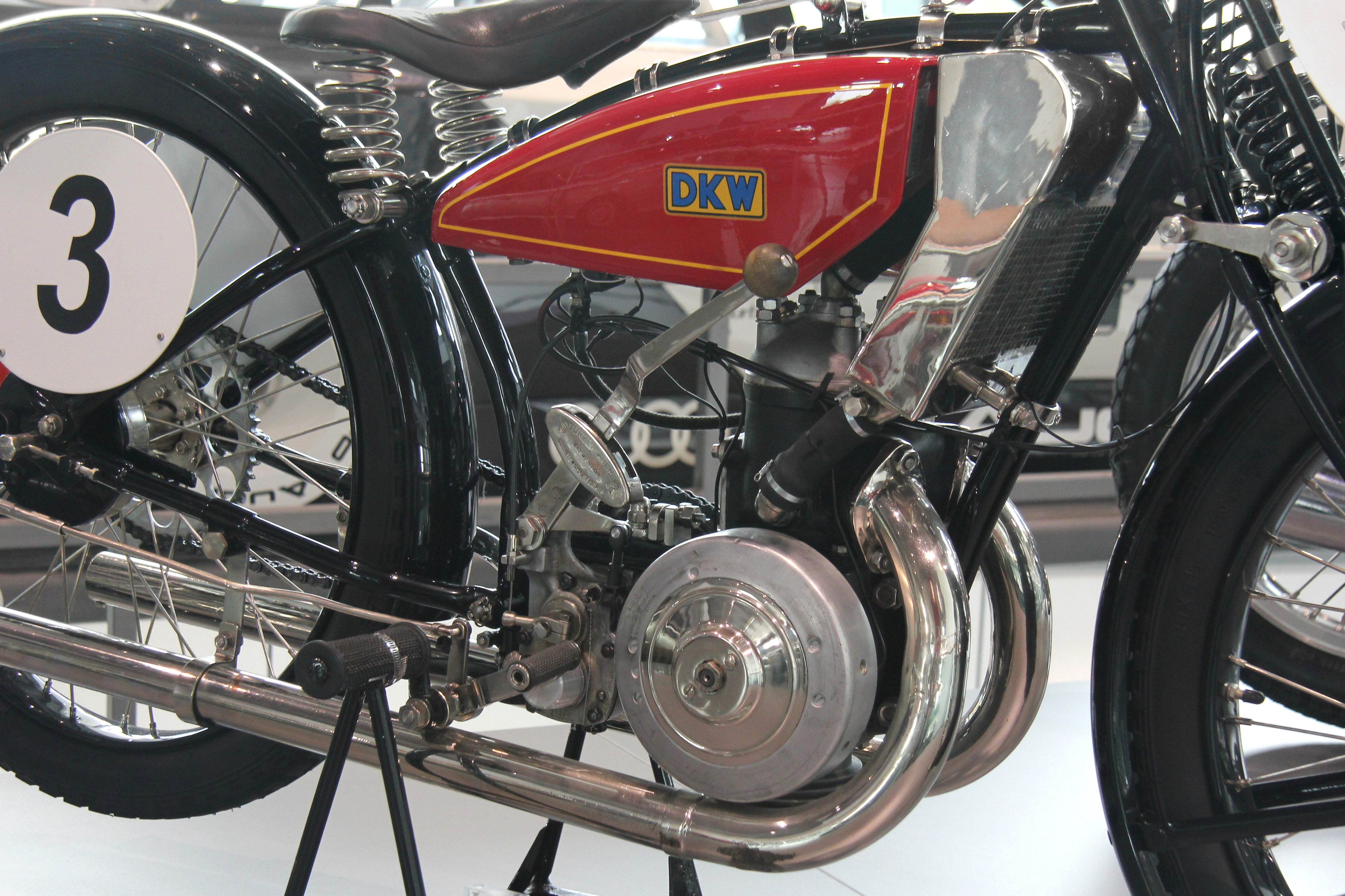 DKW ORE 250, Einzylinder-Zweitaktmotor mit Ladepumpe und Wasserkühlung, Dreiganggetriebe von Sturmey-Archer, Baujahr 1929